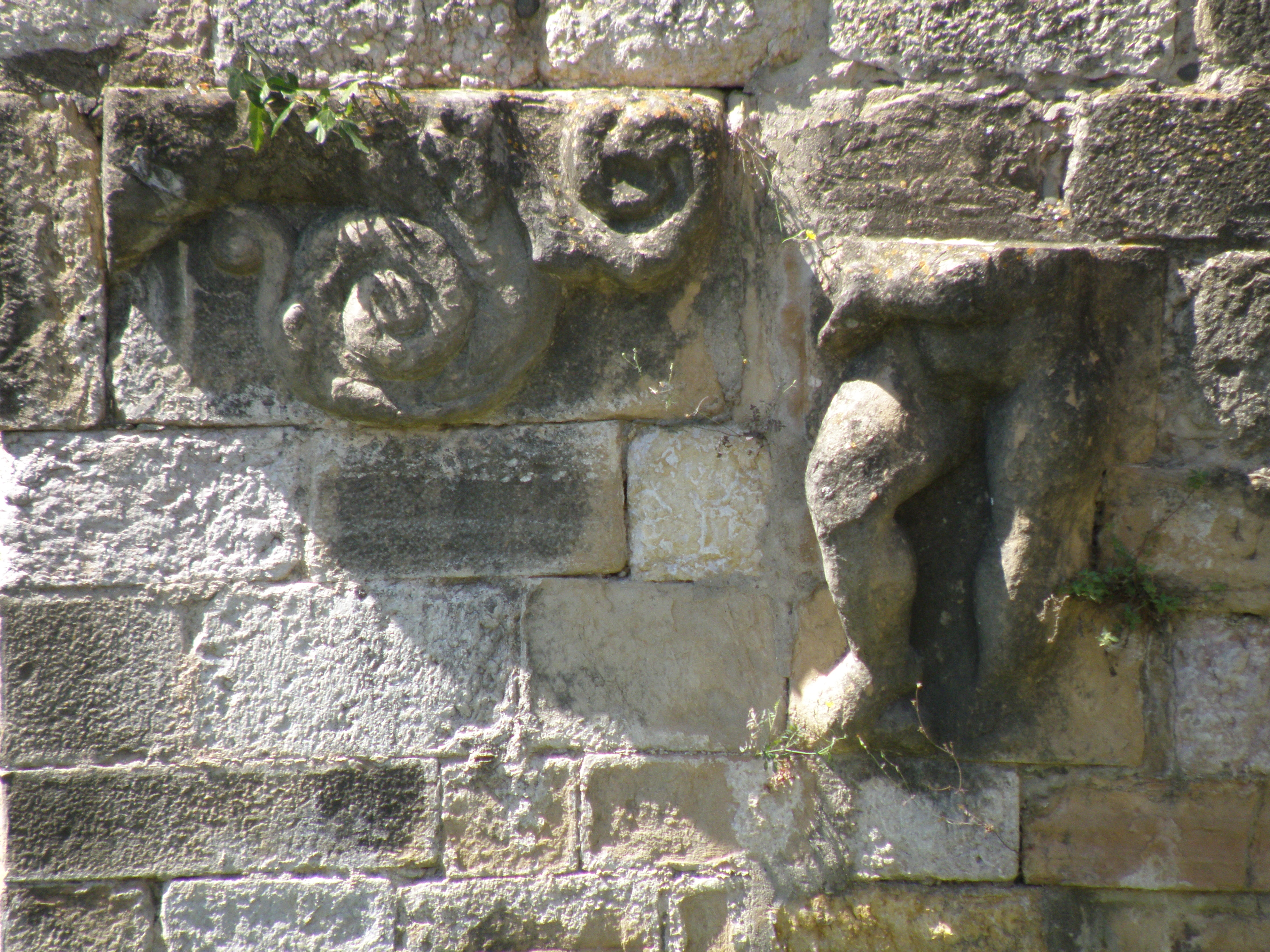 Detall del pont vell de Montblanc, la Conca de Barberà. Parts inconnexes d'escultures probablement reciclades de les rebutjades en l'església de Santa Maria i utilitzades en el pont en unes obres del s. XVIII.